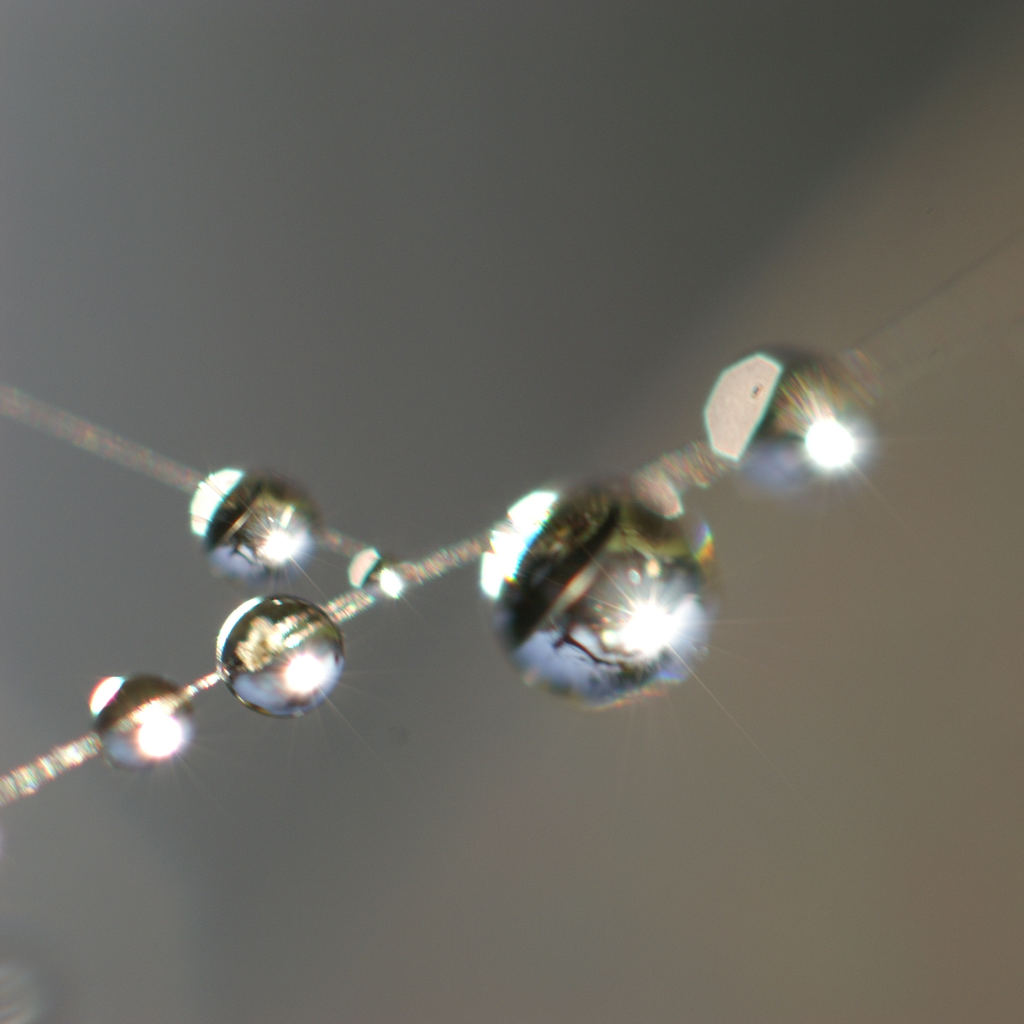 Tautropfen im Spinnennetz.